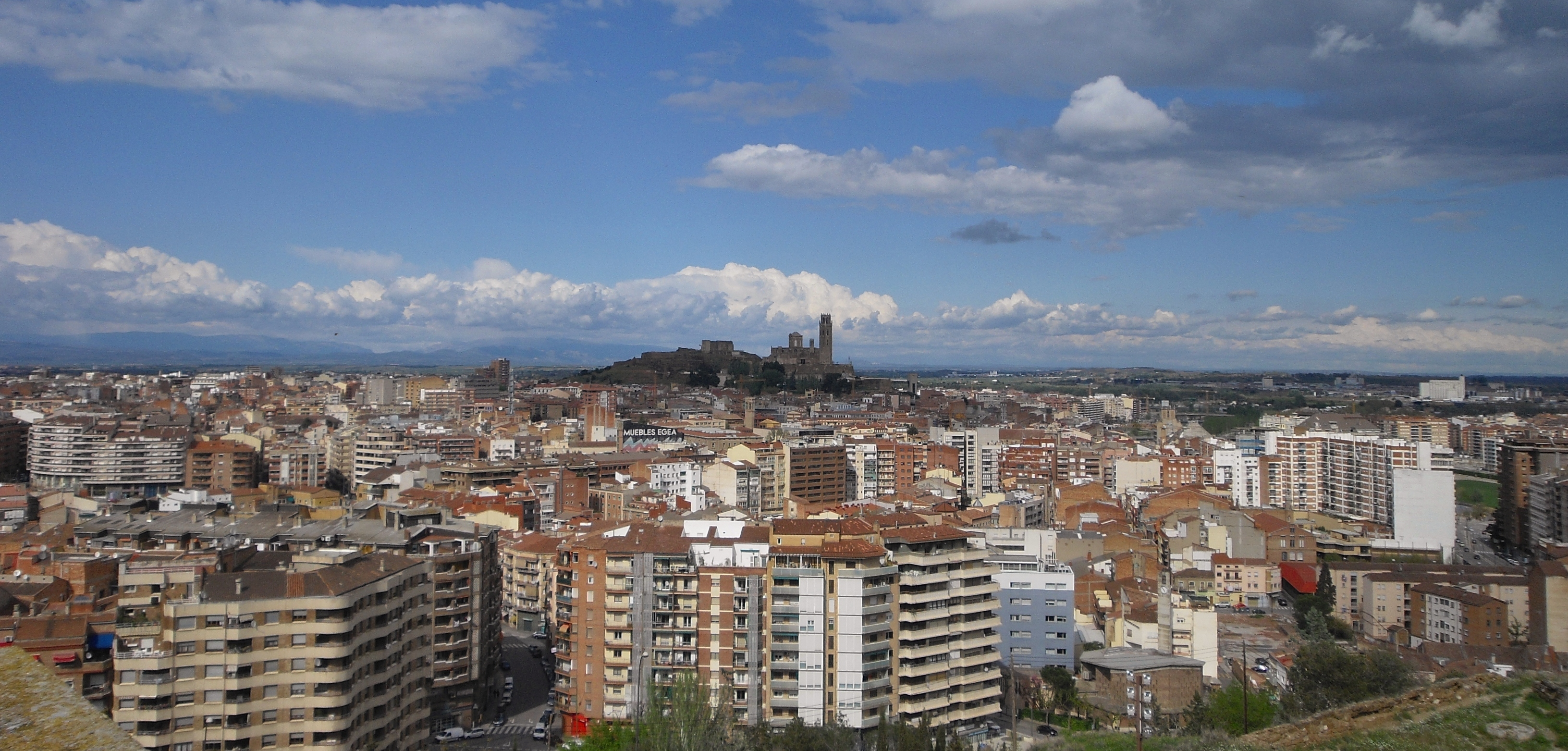 Vista de Lleida amb la Seu Vella al fons